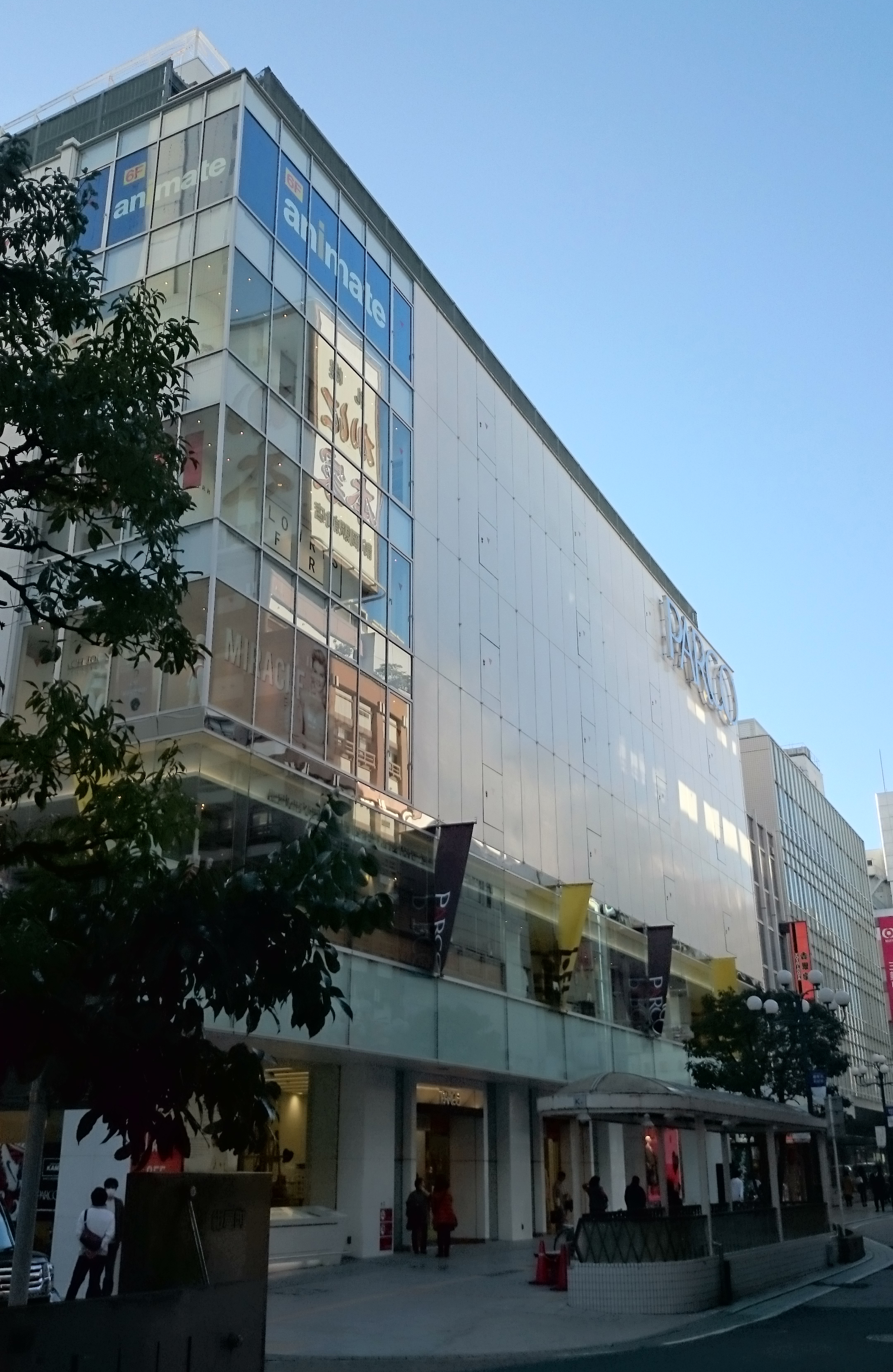 静岡パルコを「紺屋町通り」側から2011年9月6日に撮影